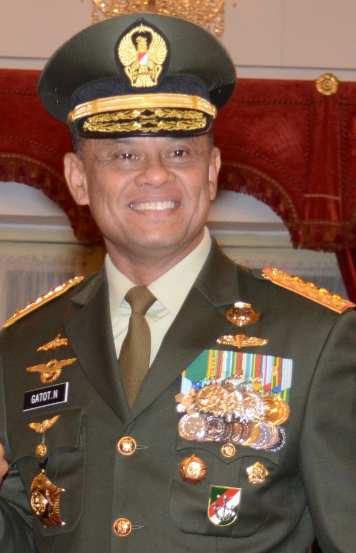 Jenderal TNI Gatot Nurmantyo, Panglima TNI, saat pelantikan KASAD Letjen TNI Mulyono di Istana Negara